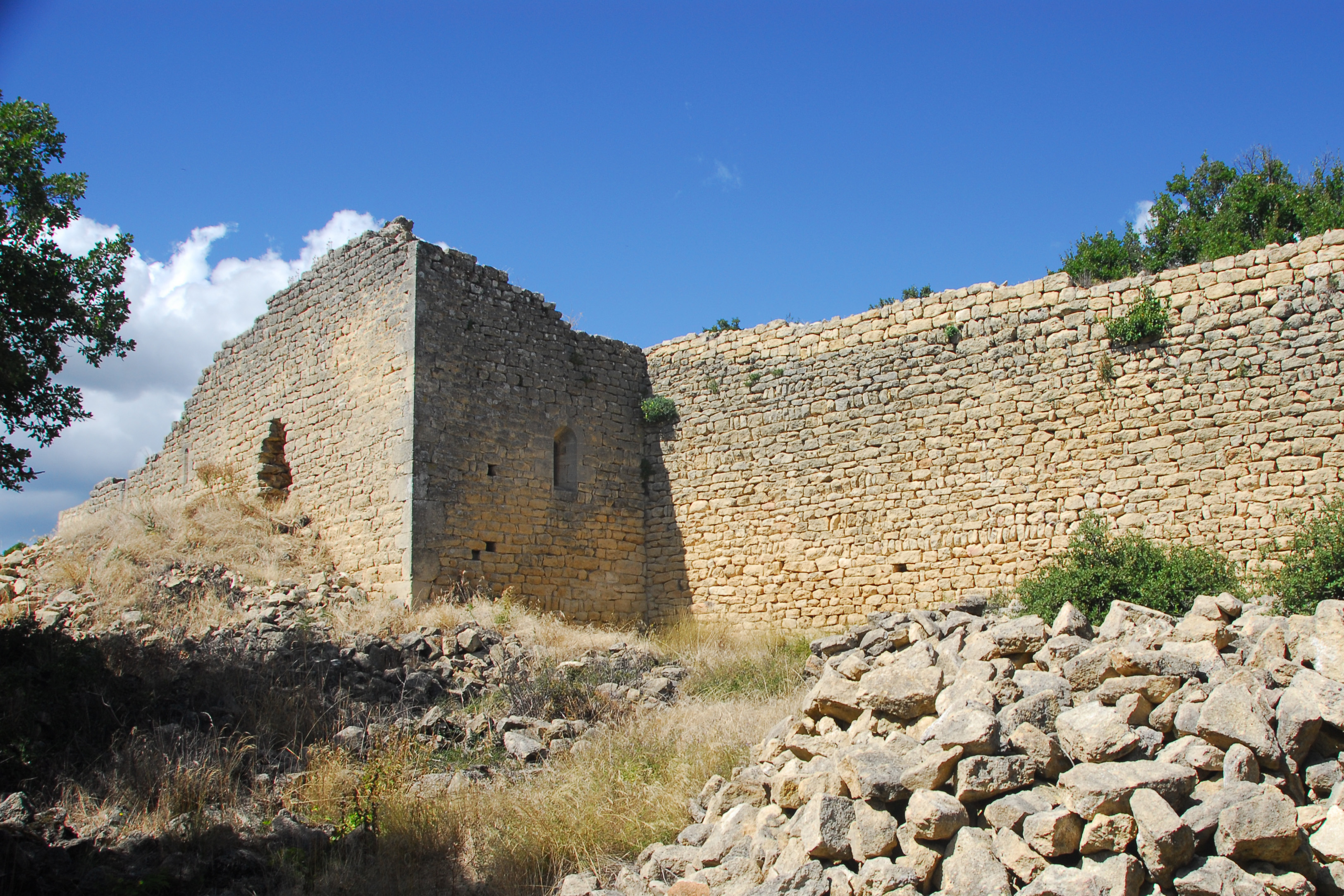 Prieuré de Ganagobie, Villevieille, südl. Wehmauer